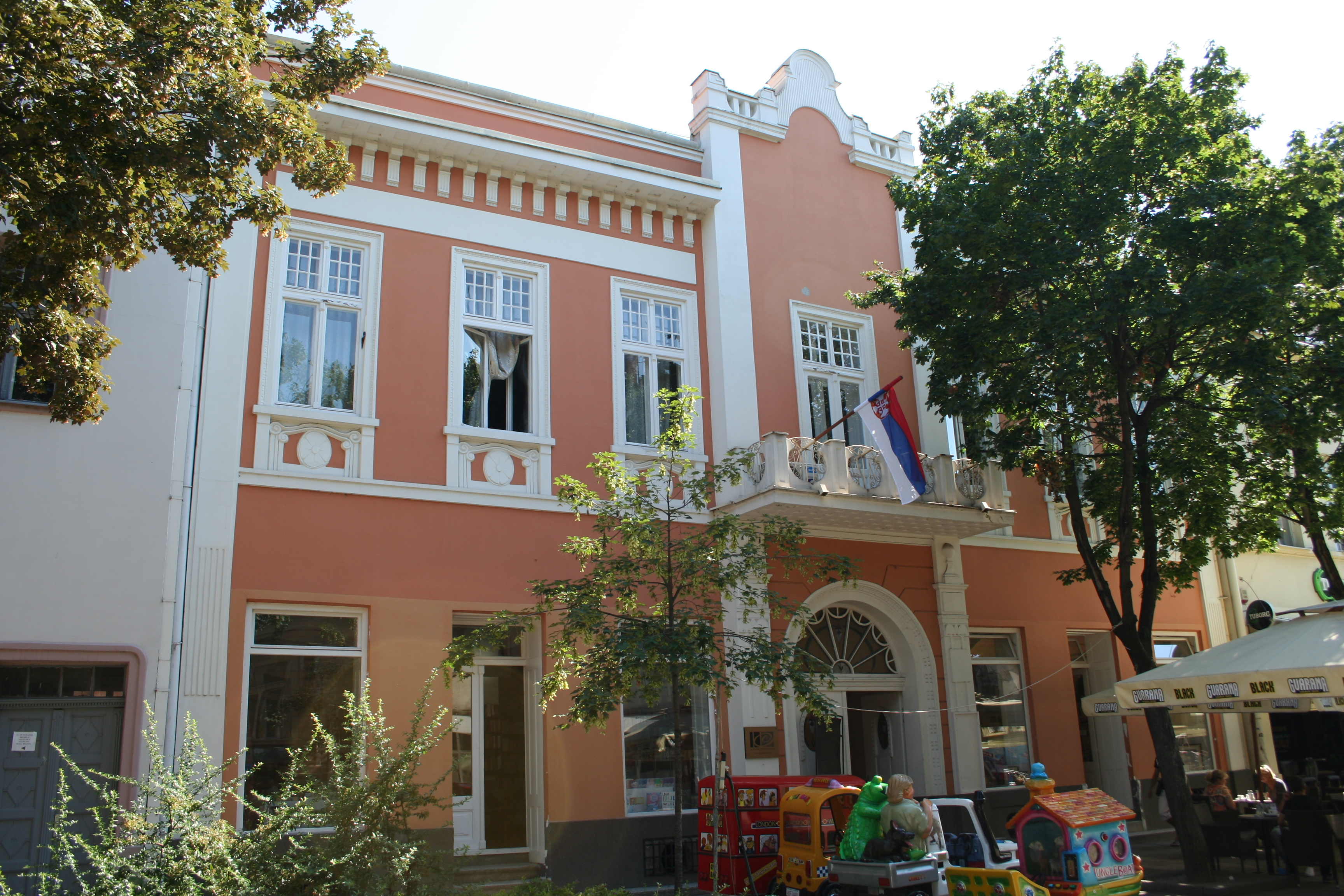 Gospodar Jevremova ulica, Šabac